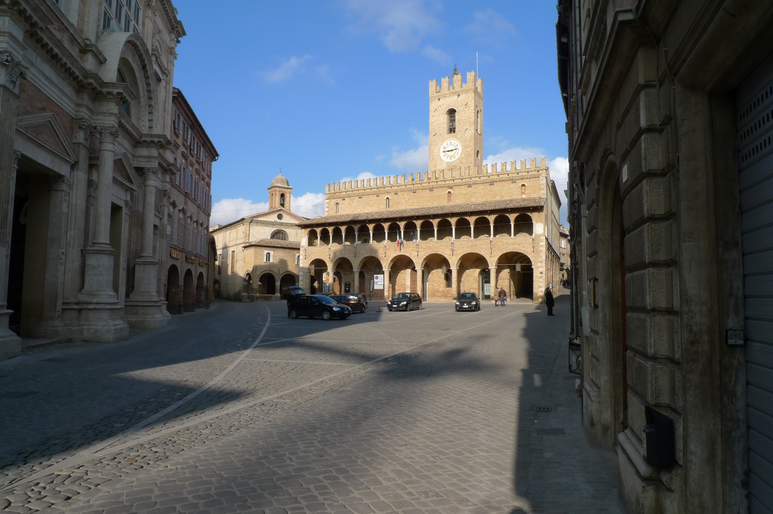 Offida, Piazza del Popolo